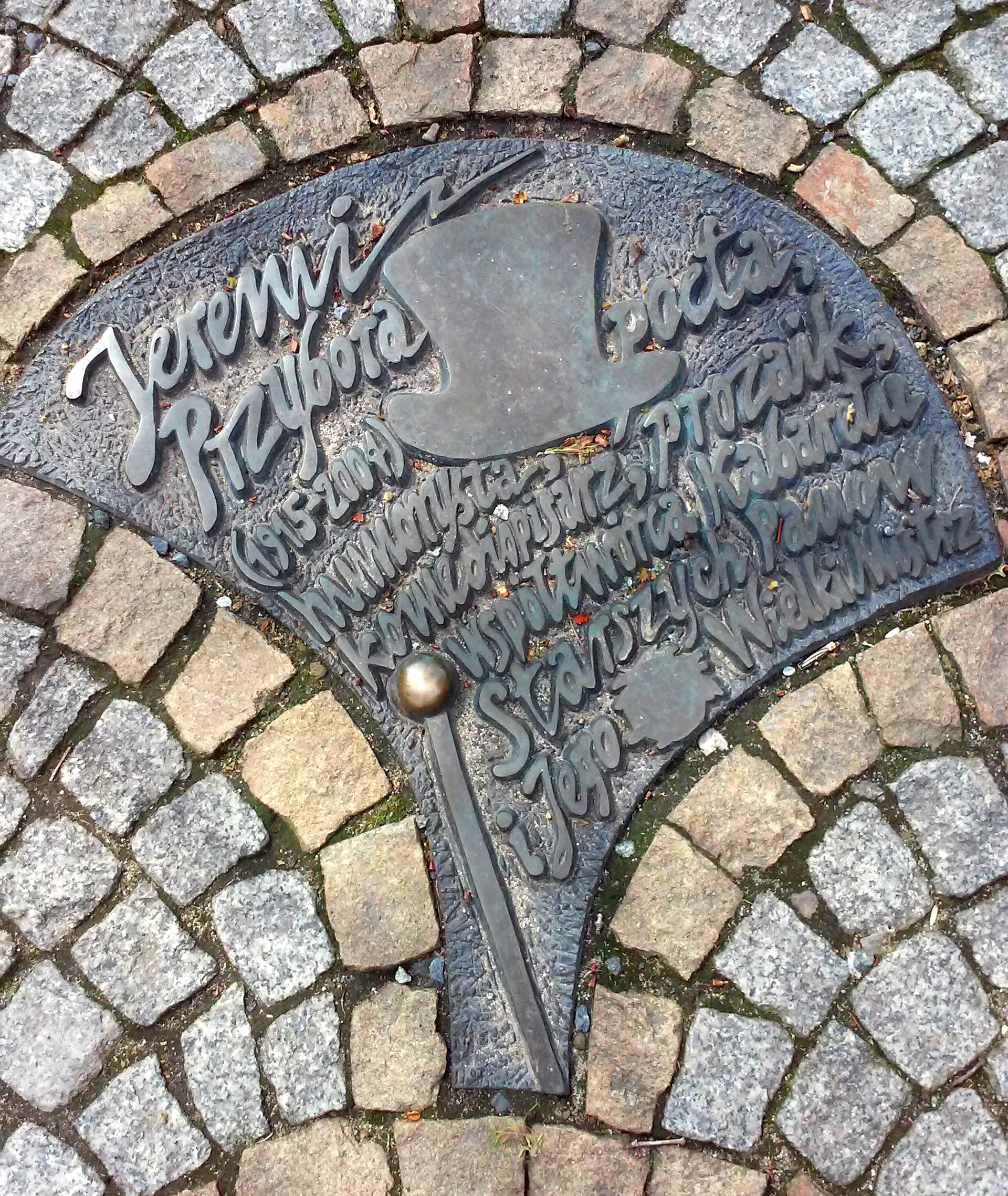 Legnica, Aleja Gwiazd Satyrykonu, tablica pamiątkowa - Jeremi Przybora